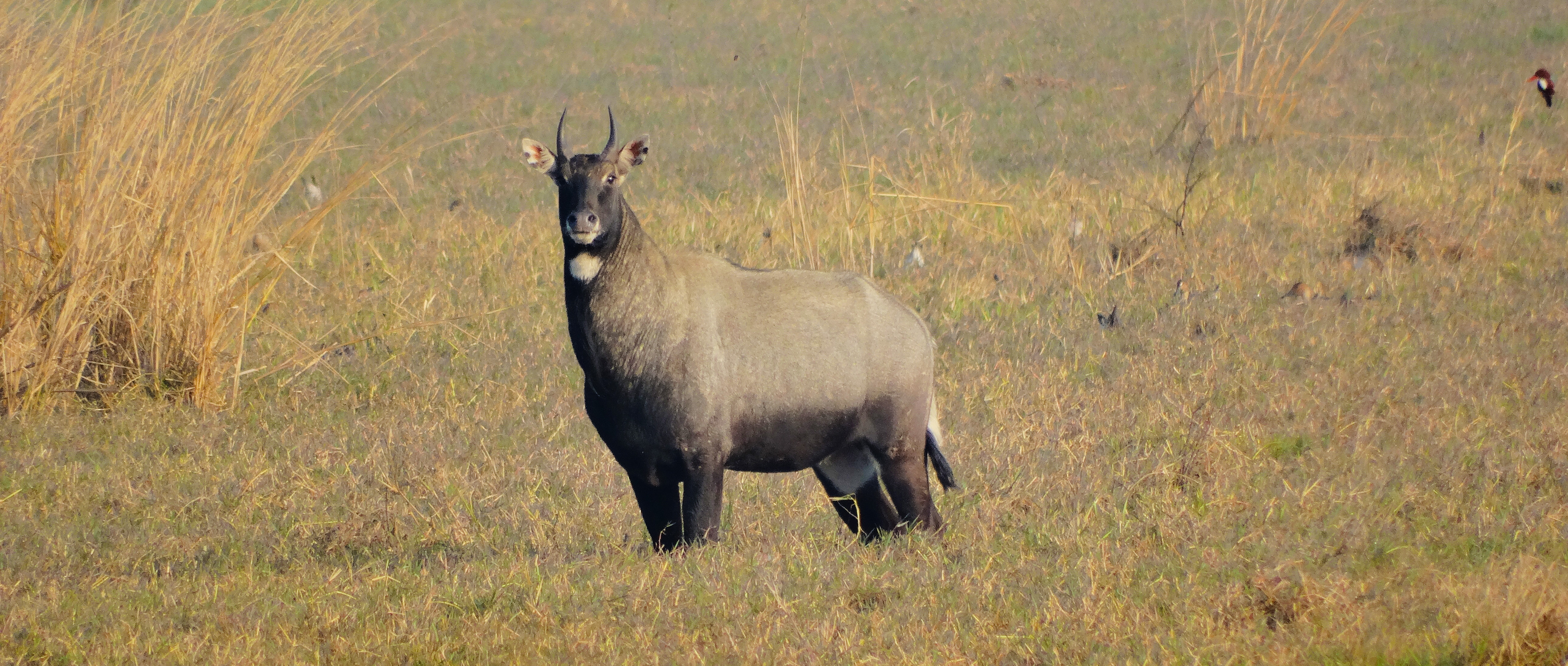 অসমীয়া: নীল গাই, ভৰতপুৰ পক্ষী উদ্যানৰ ভিতৰত